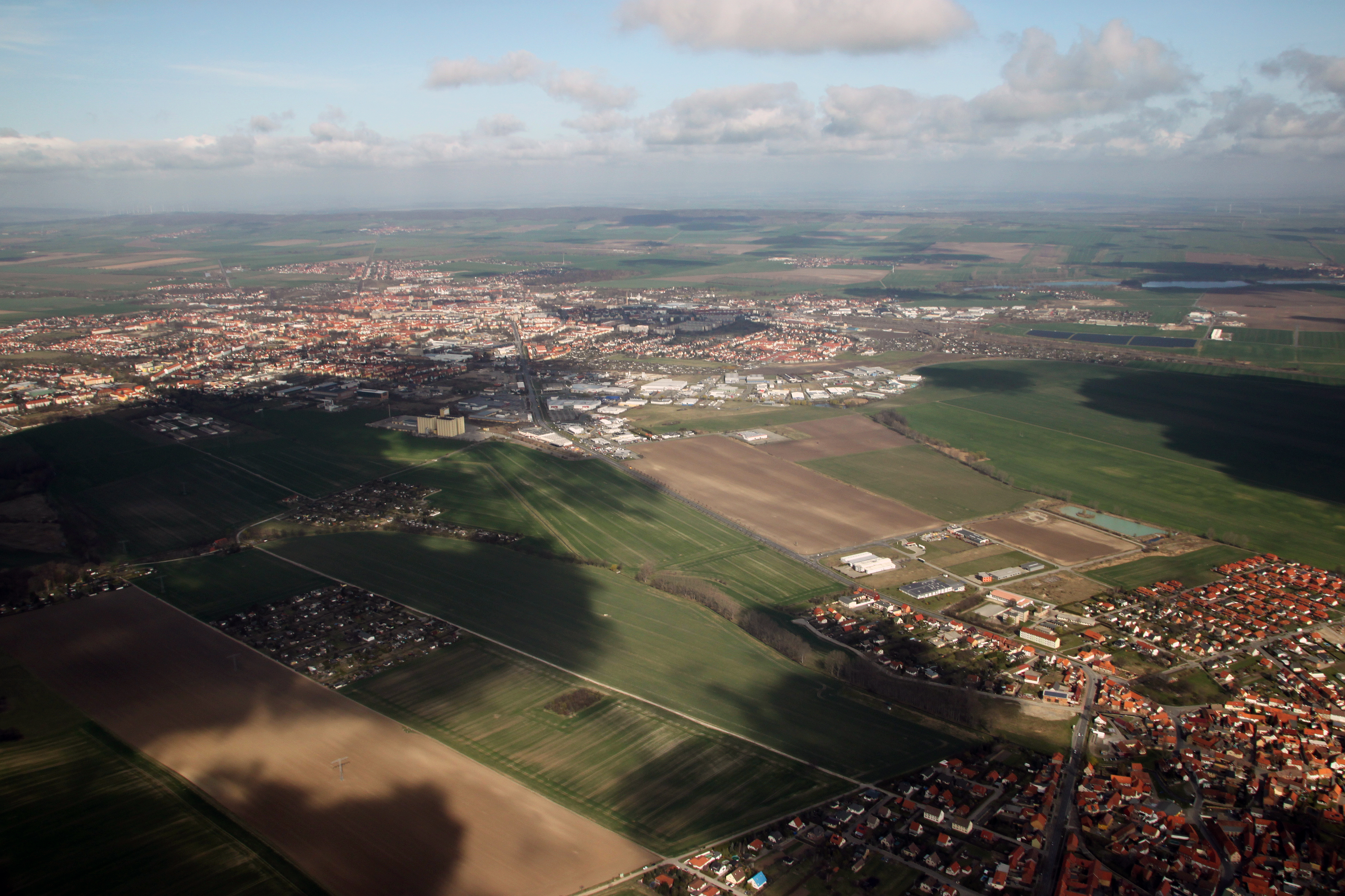 Luftaufnahme von Harsleben (vorn rechts) und Halberstadt (hinten links) im April 2012